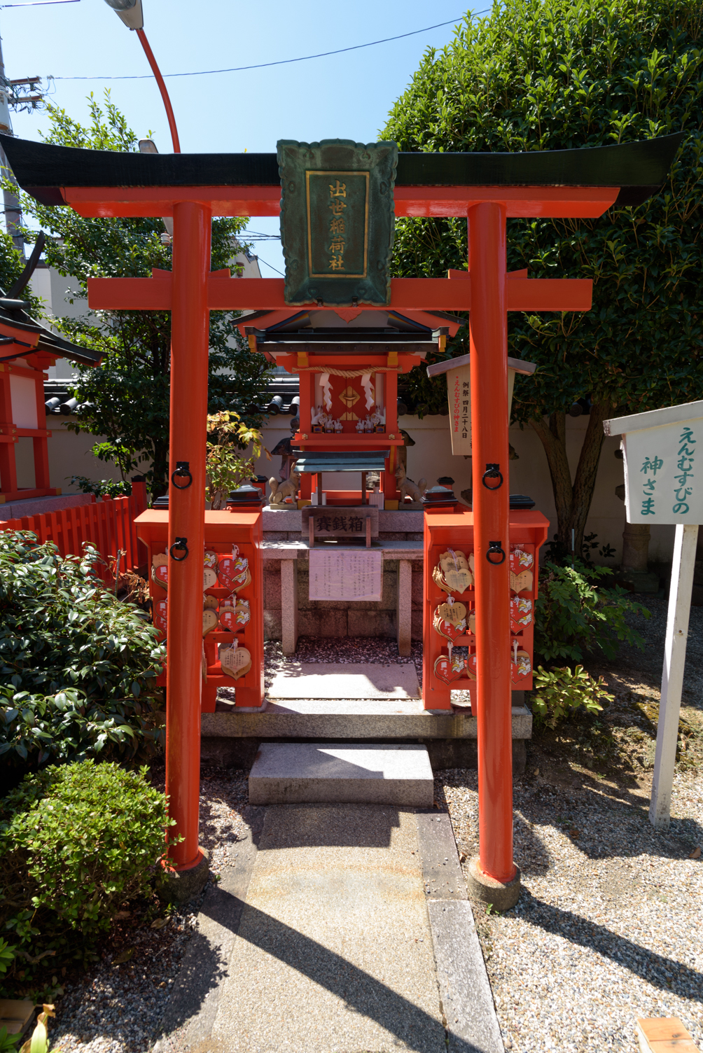 御霊神社出世稲荷社